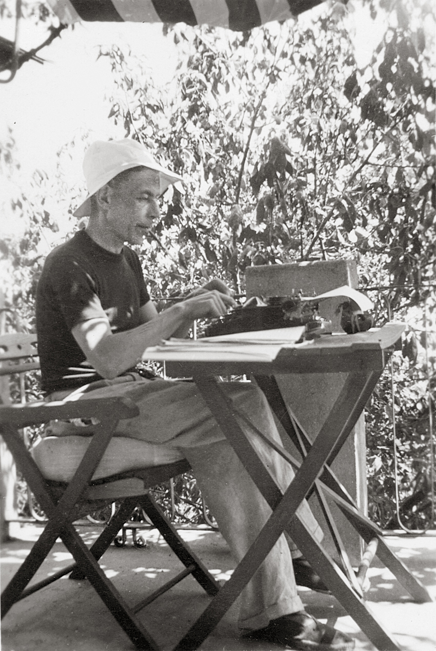 Friedrich Glauser in Nervi bei Genua